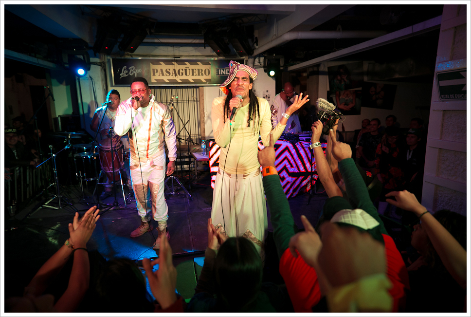 27.11.2014 - Pasagüero Full Gallery